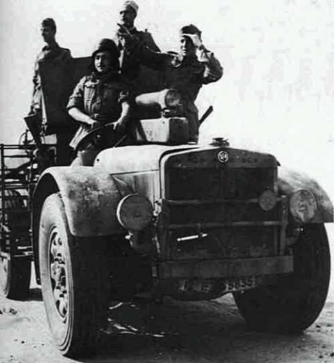 autocannone configurazione marcia